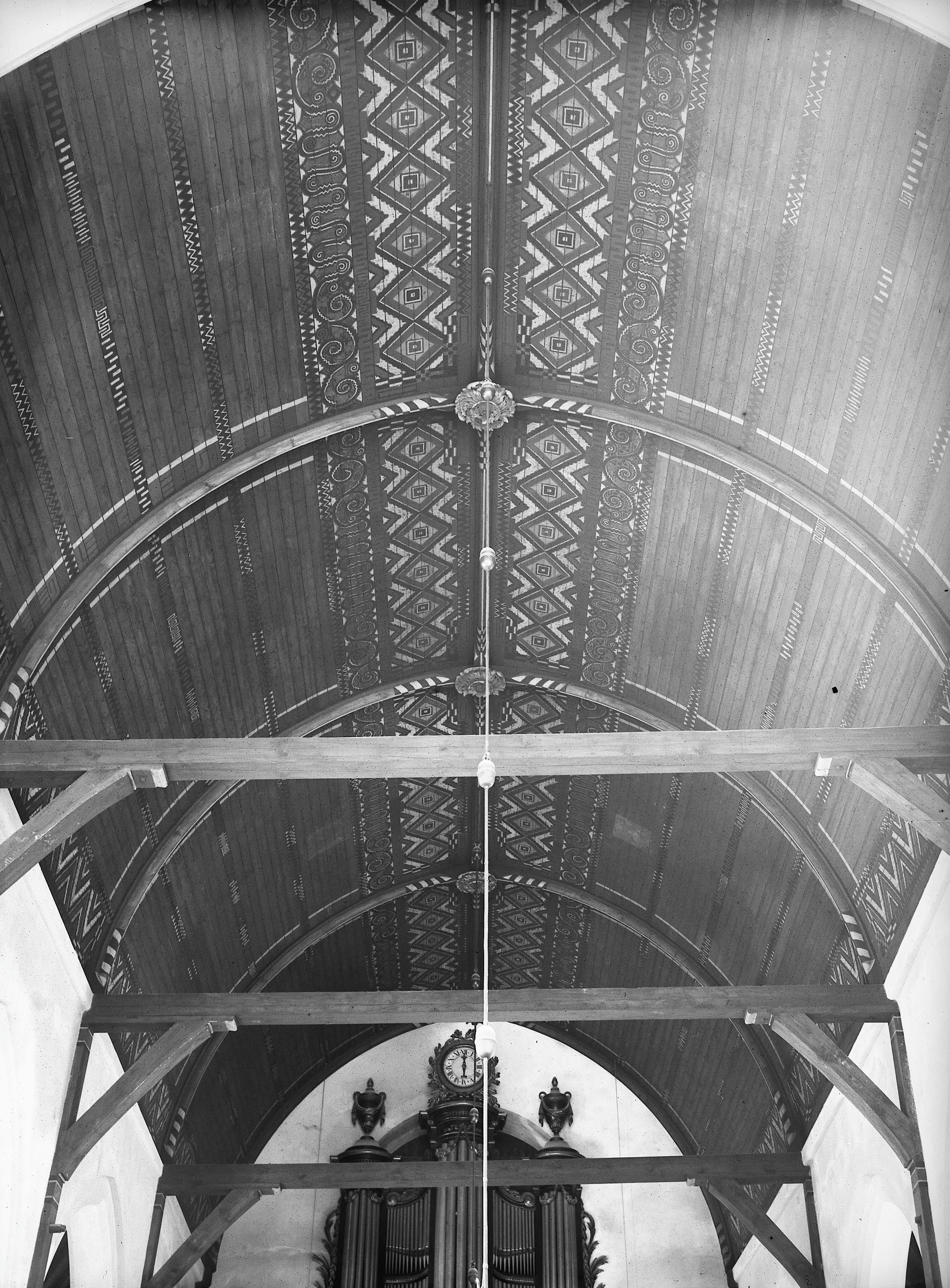 Nederlands Hervormde Kerk: houtengewelf schip na de restauratie (opmerking: Fotonummer 9188)